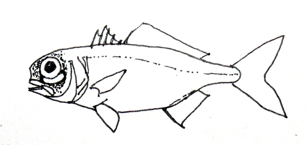 Anomalops katoptron